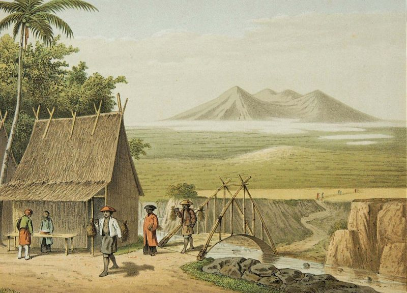 Litho. Kleurenlitho naar een oorspronkelijke aquarel van Rappard.. Een hangbrug te Buitenzorg